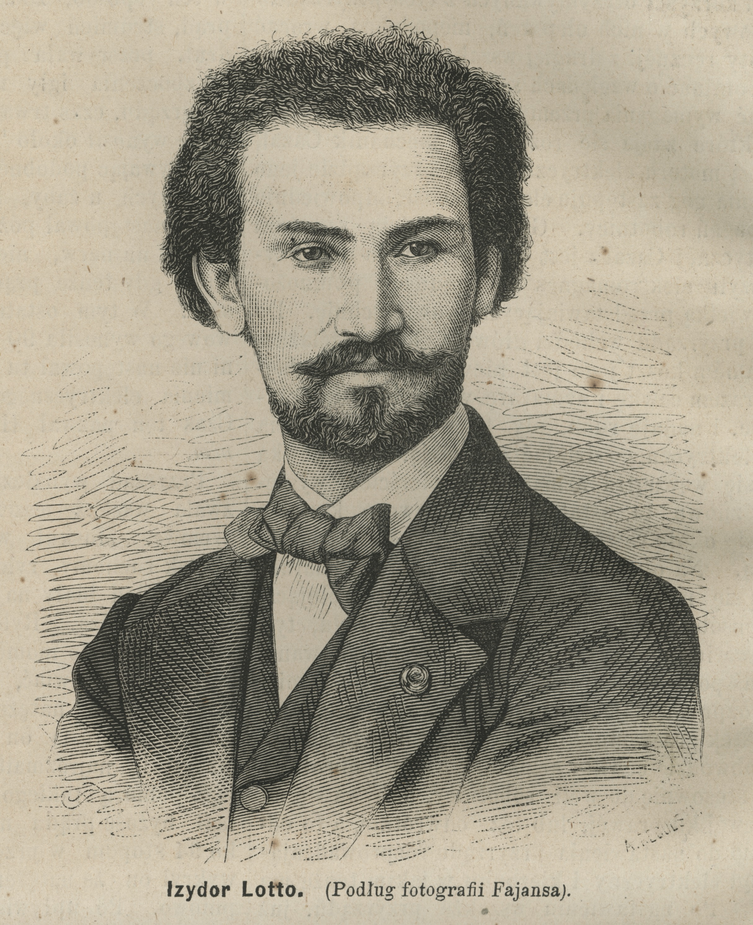 Izydor Lotto (Podług fotografii Fajansa)